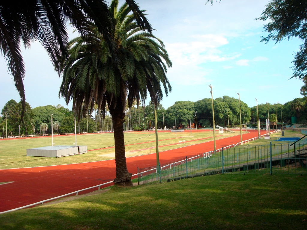 Pista de Atletismo Darwin Piñeirúa, Parque Batlle, Montevideo, Uruguay.